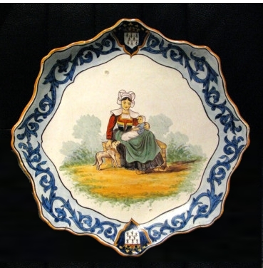 Assiette en Faïence de Desvres, Geo Martel, vers 1900, France